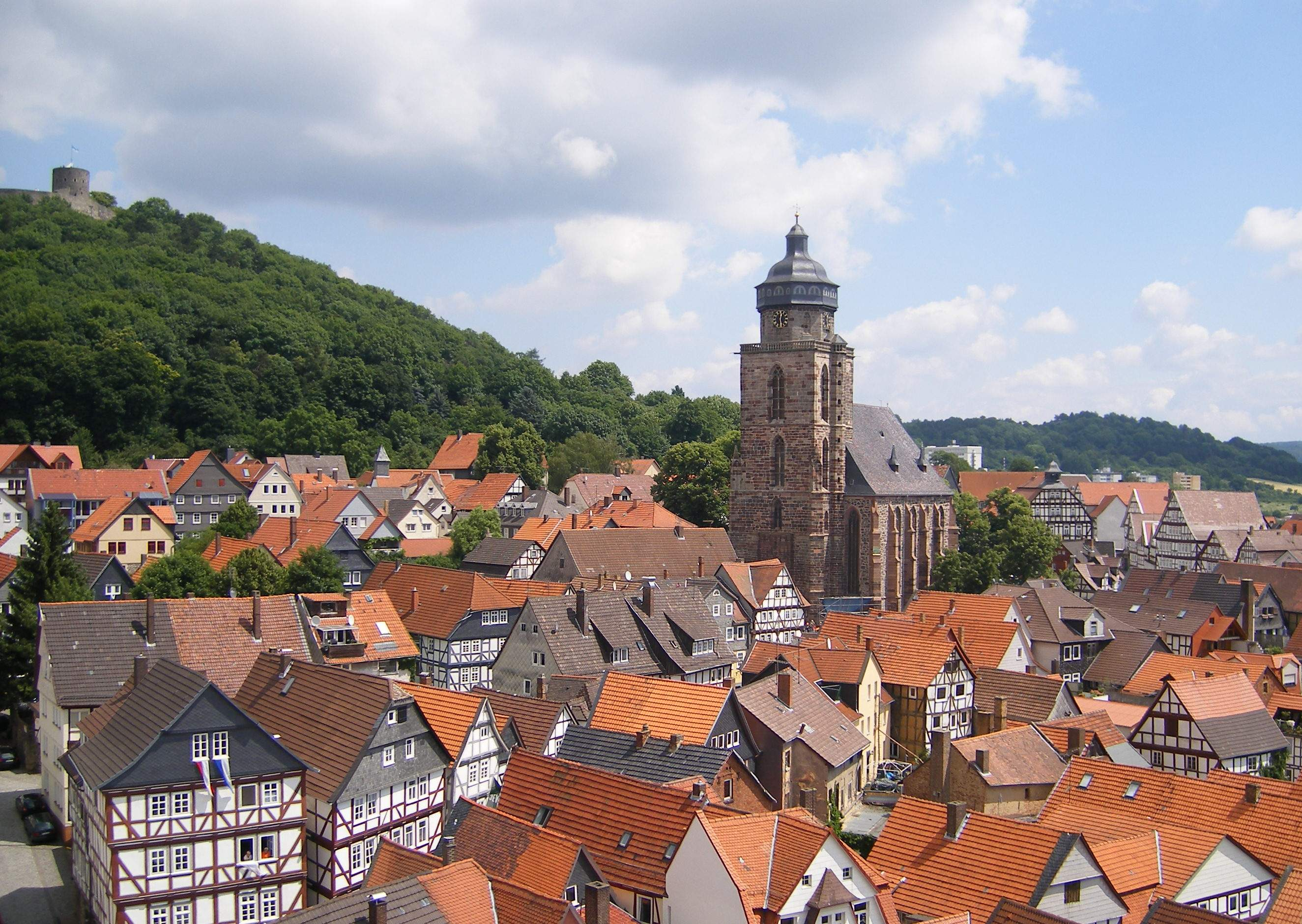 Blick vom Riesenrad auf die Altstadt